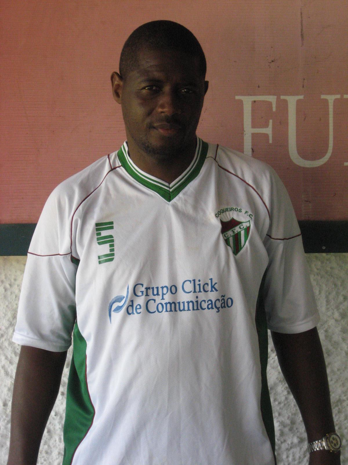 Marcos Valério da Silva, o Marquinhos, presidente do Coqueiros Futebol Clube, de São João de Meriti.